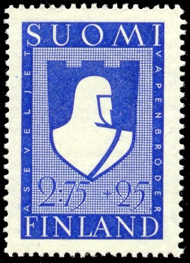 Aseveliliiton postimerkki 1940